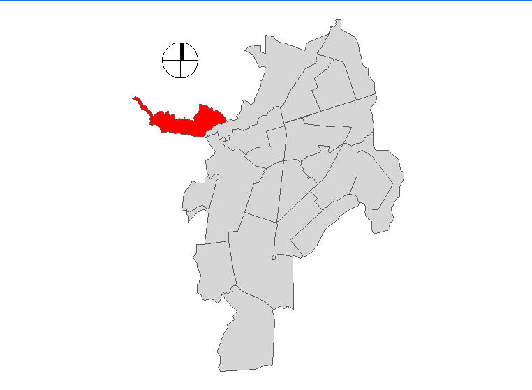 Comuna de Santiago de Cali, Colombia.